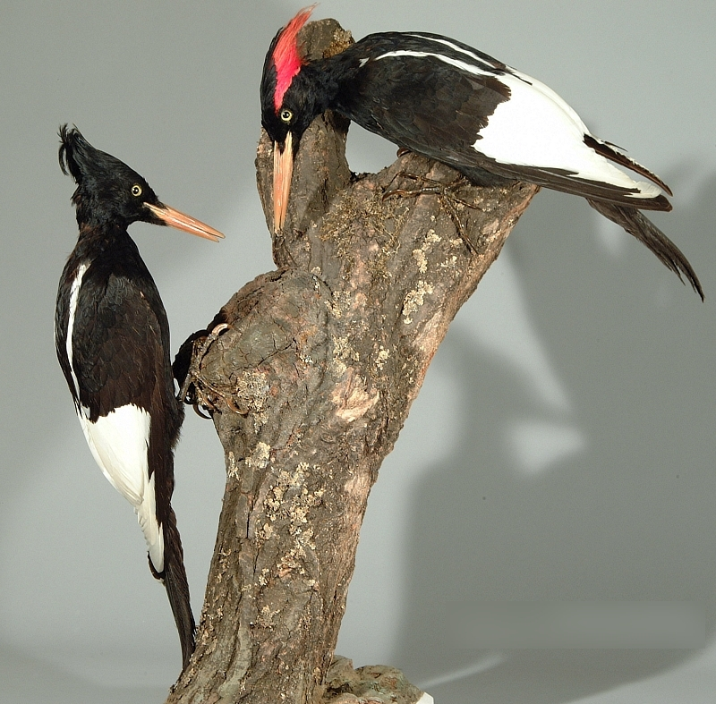 Kaiserspecht, (Campephilus imperialis), male and female from Mexico, Museum Wiesbaden, MWNH, Naturhistorische Landessammlung